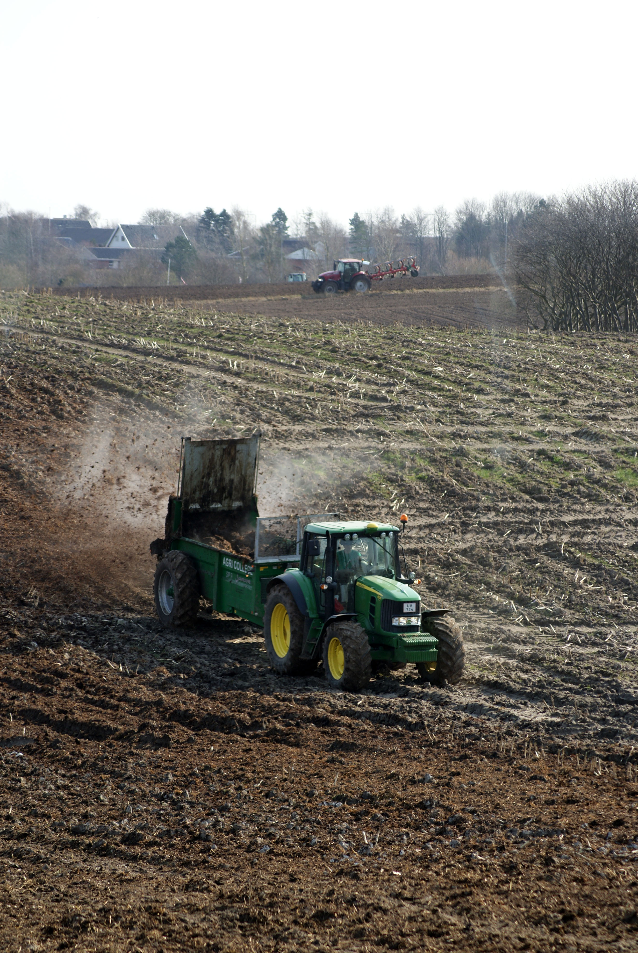 En del af tech college aalborg